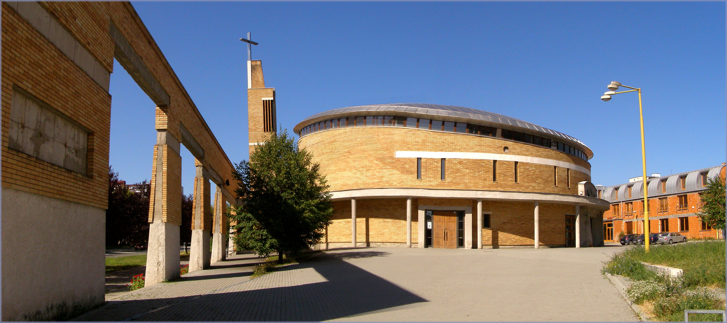 Kostol